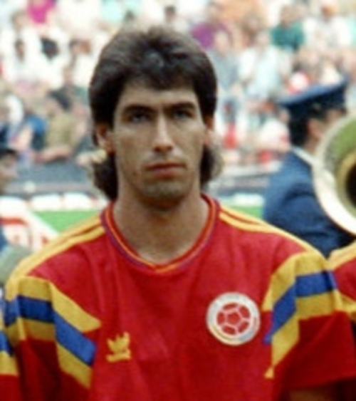 La selección de Colombia durante la Copa del Mundo de fútbol XIV para "Italia 90"; el equipo nacional de América del Sur terminó su recorrido en la segunda ronda, su mejor resultado en la historia de la clasificación de eventos.